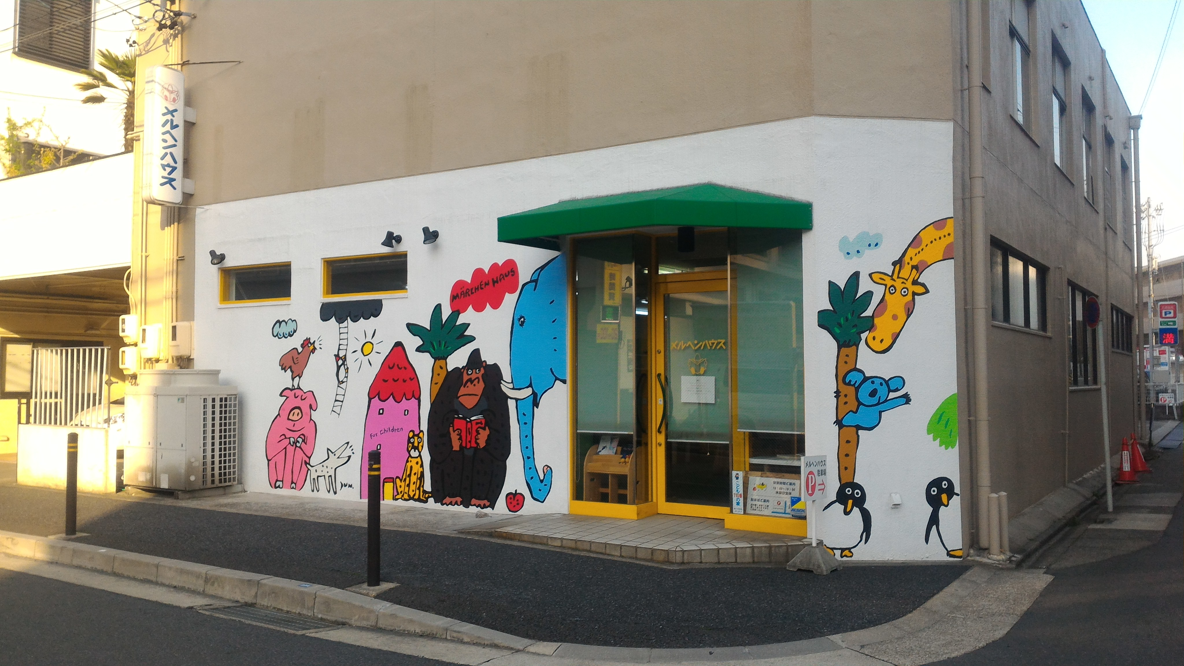 メルヘンハウス、愛知県名古屋市に存在した書店。